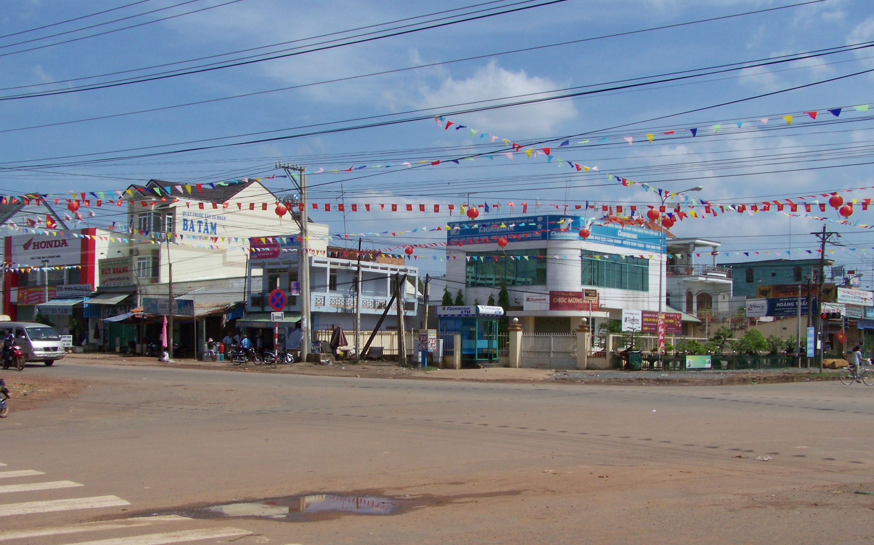 Thị trấn Chơn Thành, Chơn Thành, Binh Phuoc